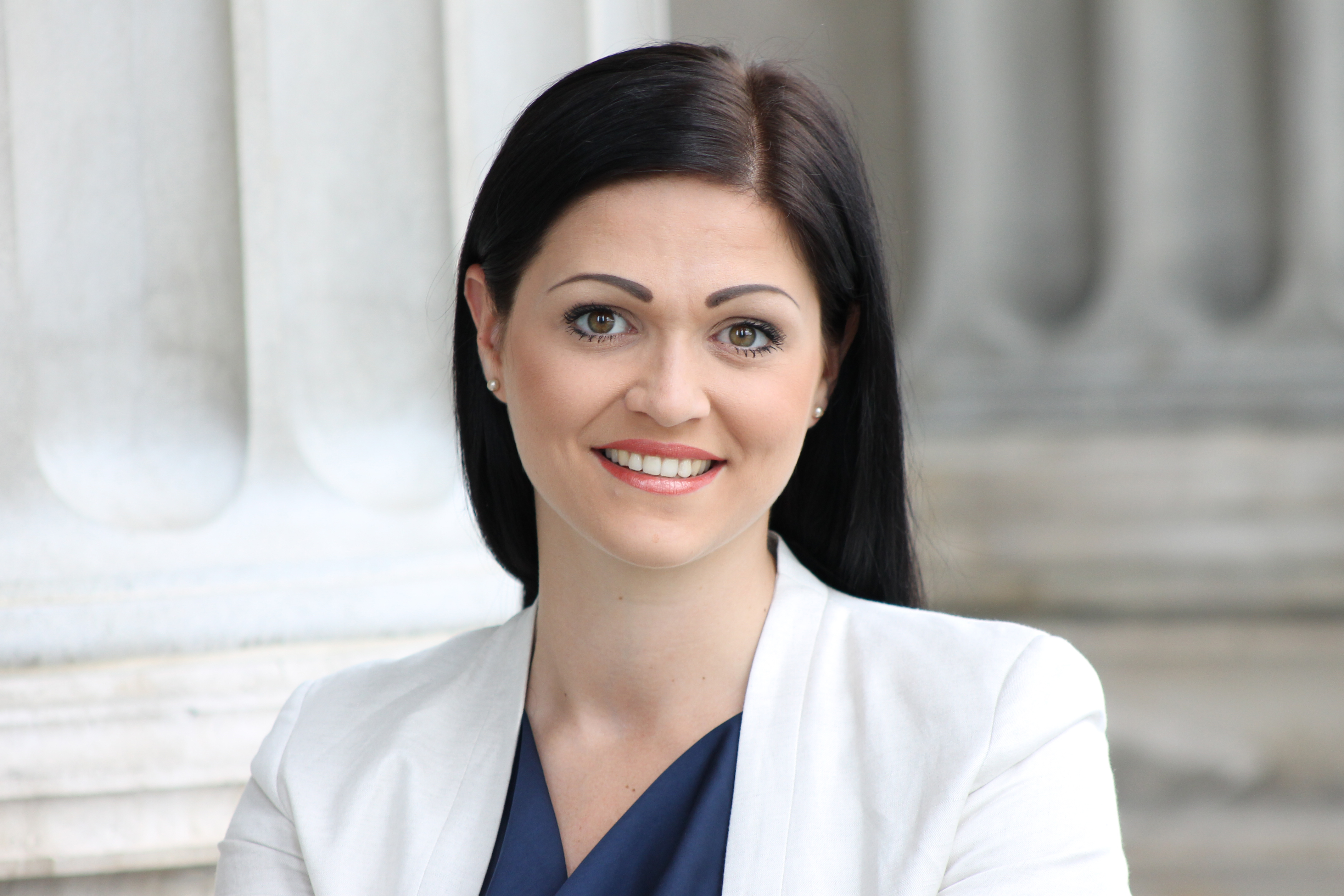 Daniela Holzinger